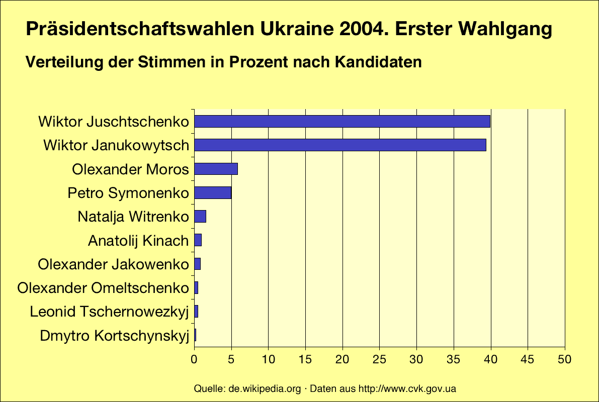 Wahlergebnisse Präsidentschaftswahl Ukraine, 1. Wahlgang.